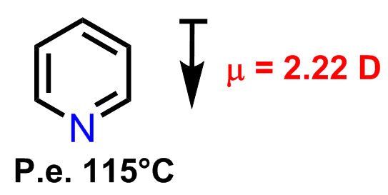 Basicità della piridina